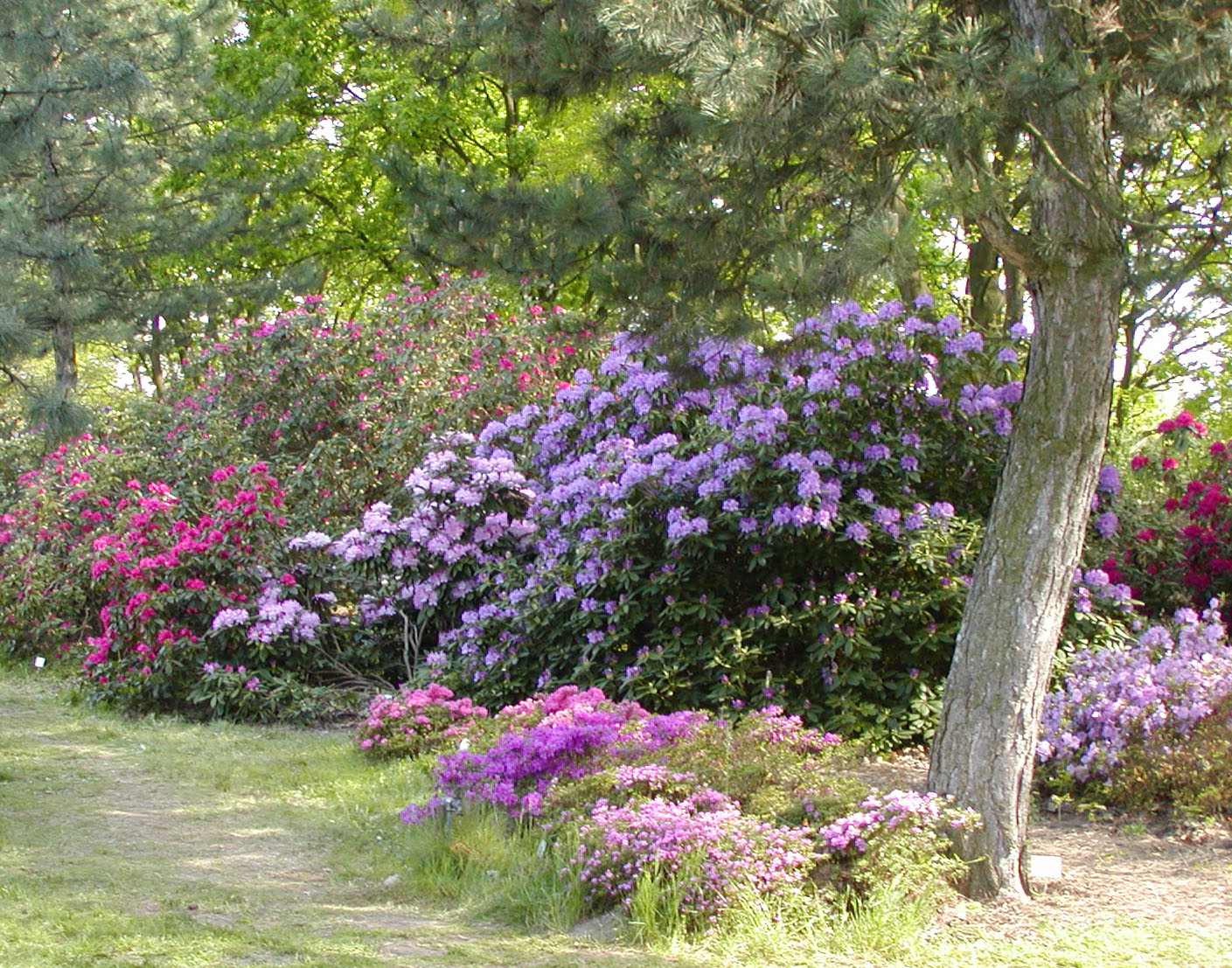 Ogród Botaniczny PAN w Powsinie Botanical Garden in Powsin, Warsaw